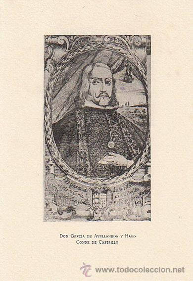 Don García de Avellaneda